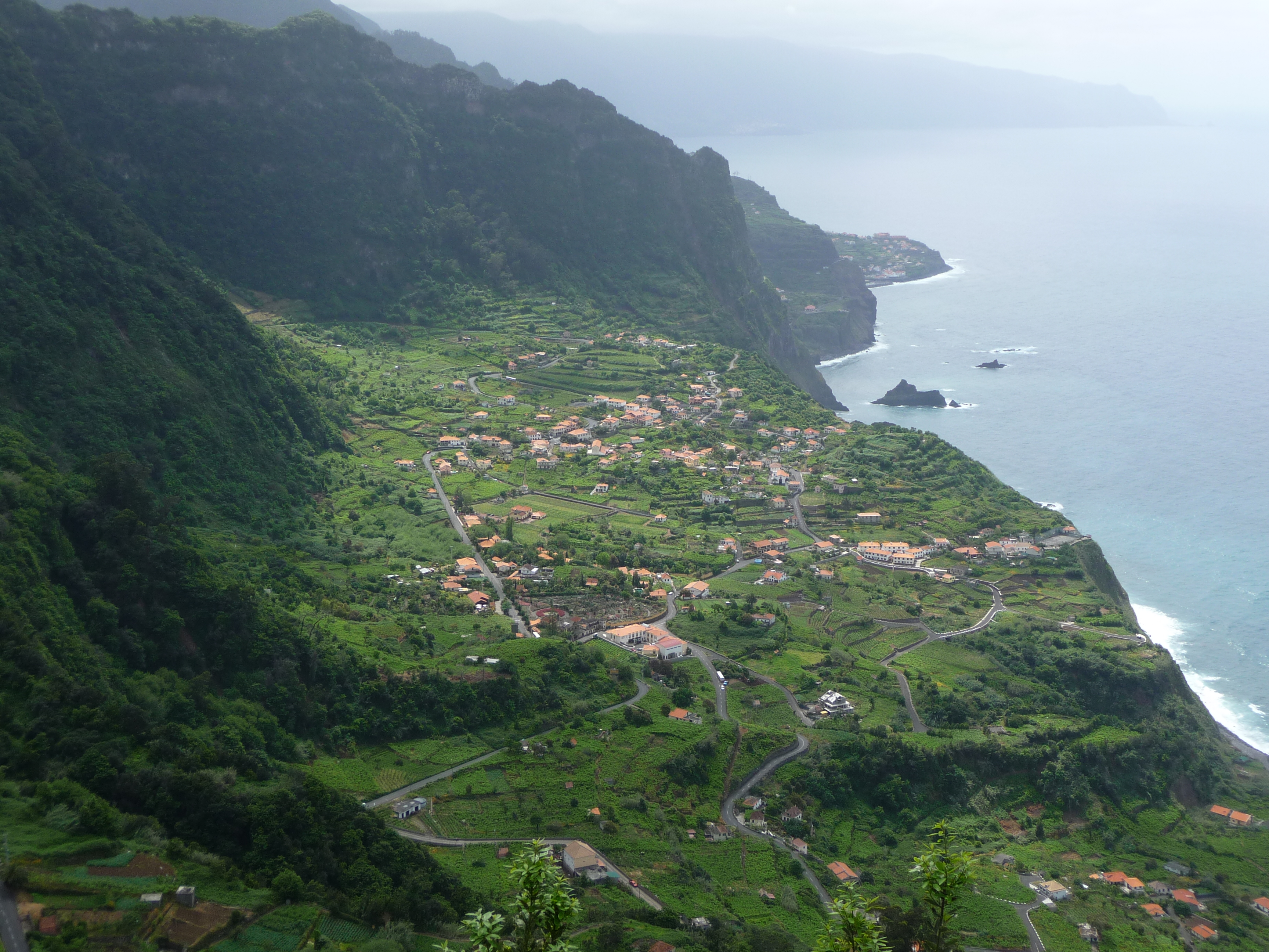 Arco de Sao Jorge 5-09